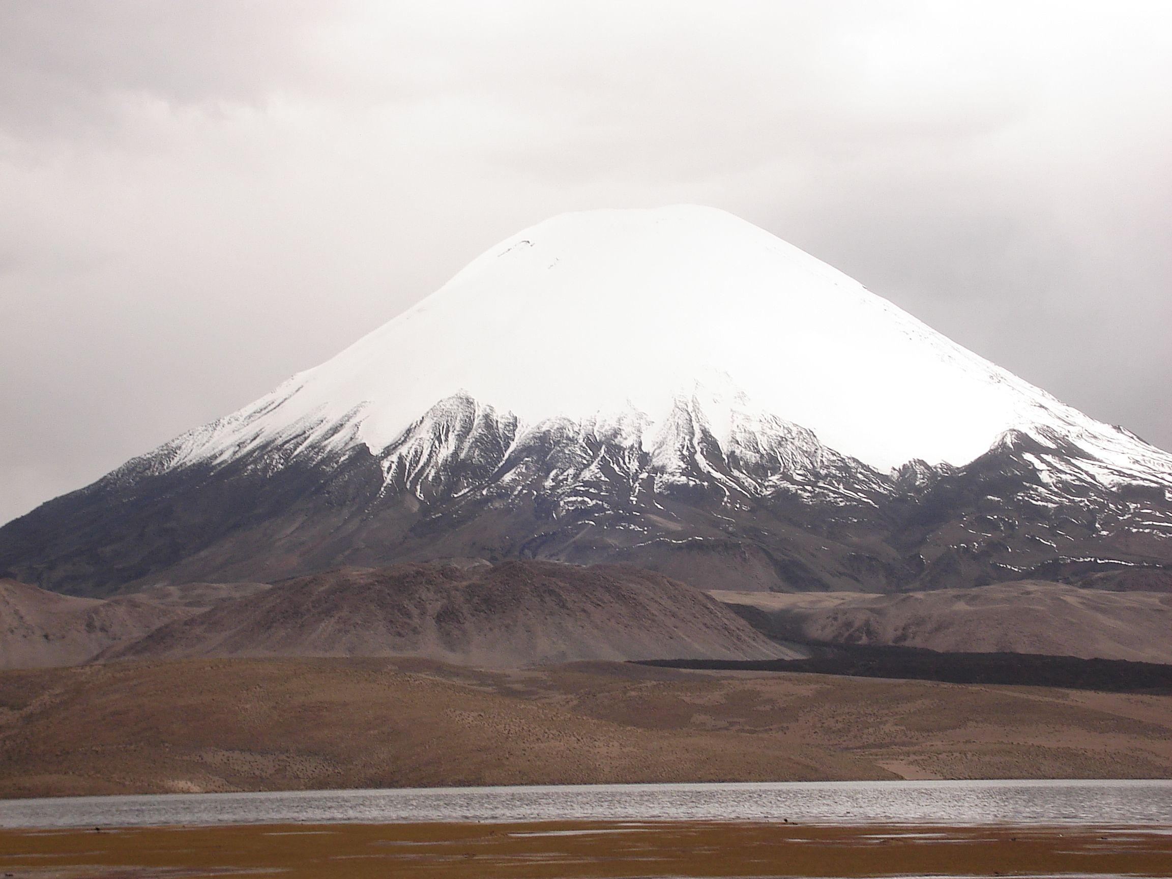 Foto tirada por mim, em Arica.